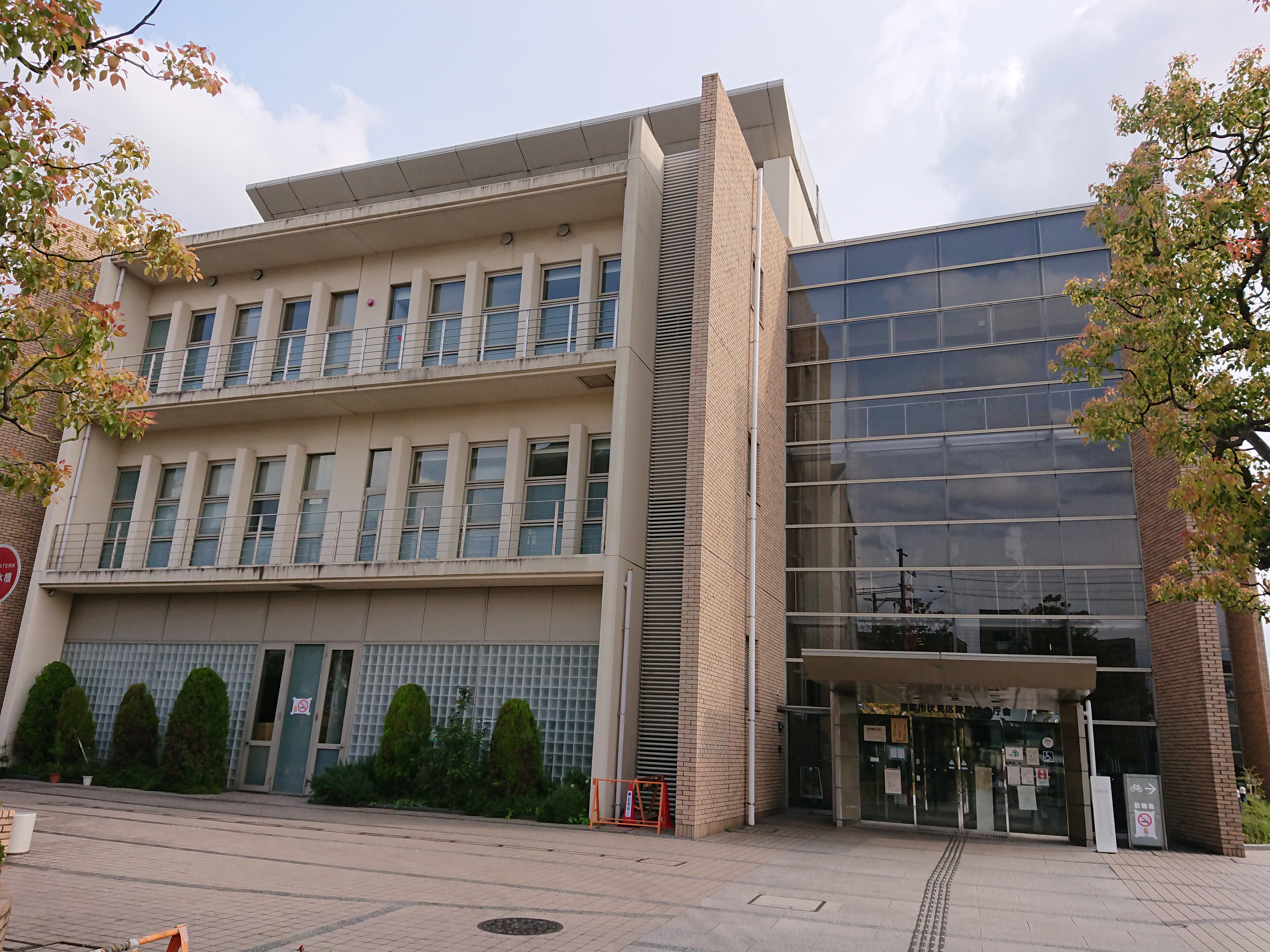 伏見区役所深草支所（京都市伏見区）